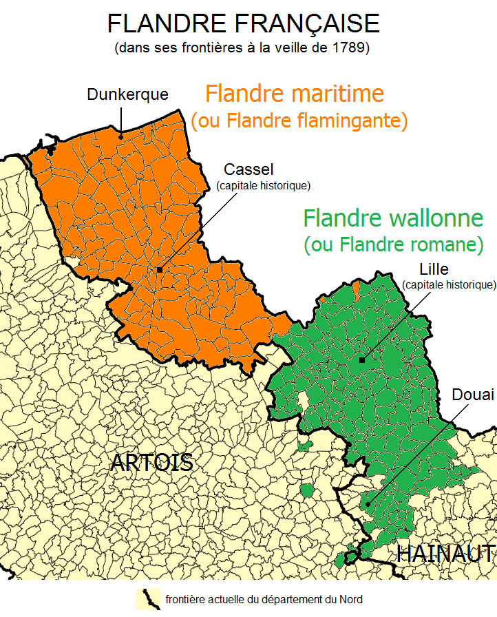 Carte de la Flandre française dans ses frontières à la veille de 1789, basée sur l'État par ordre alphabétique des Villes, Bourgs, Villages & hameaux de la Généralité de Flandres & d'Artois publié en 1787.